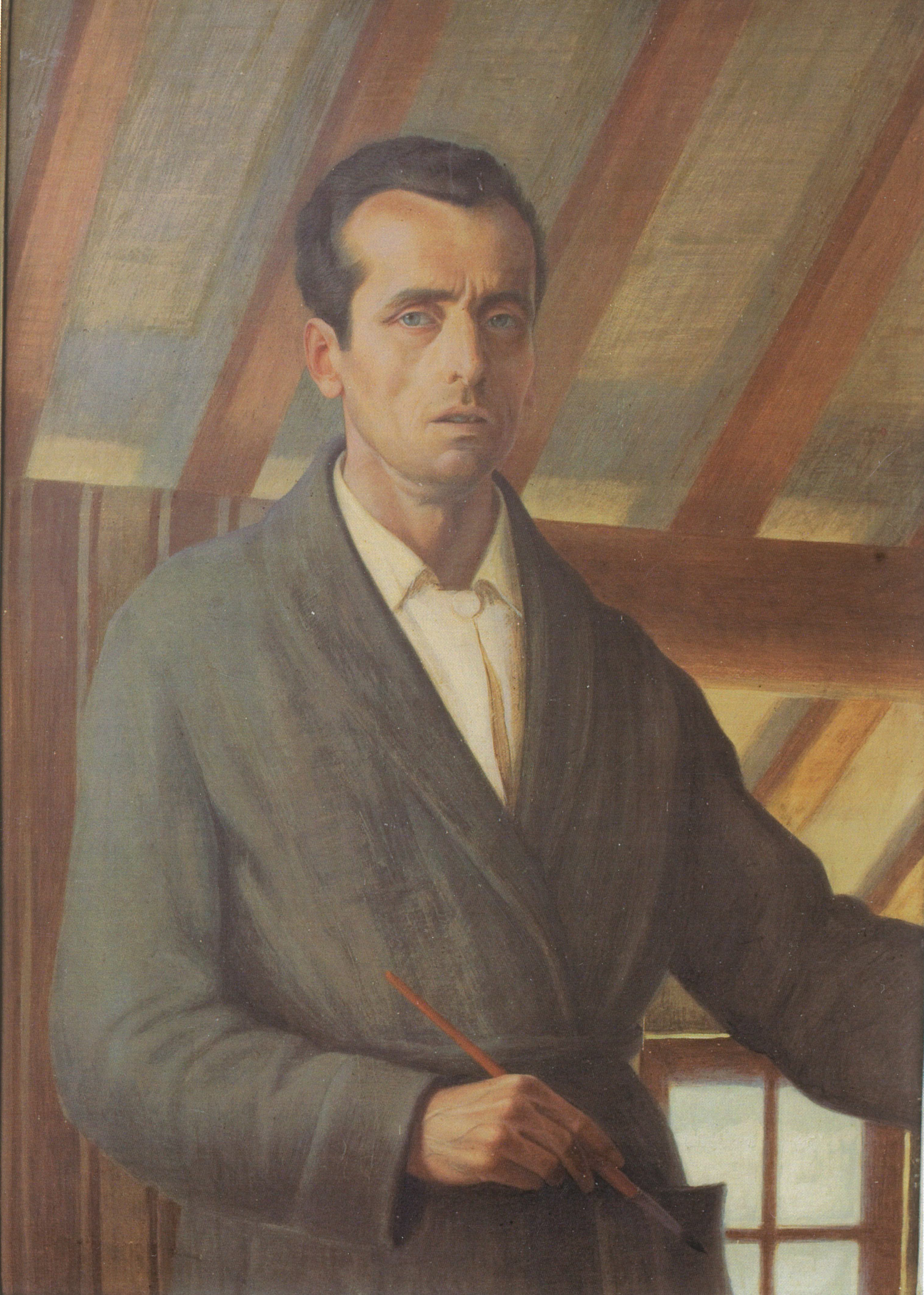 Autoritratto del pittore fiorentino Federigo Angeli, 1932 ca. Tempera su cartone 69 x 98